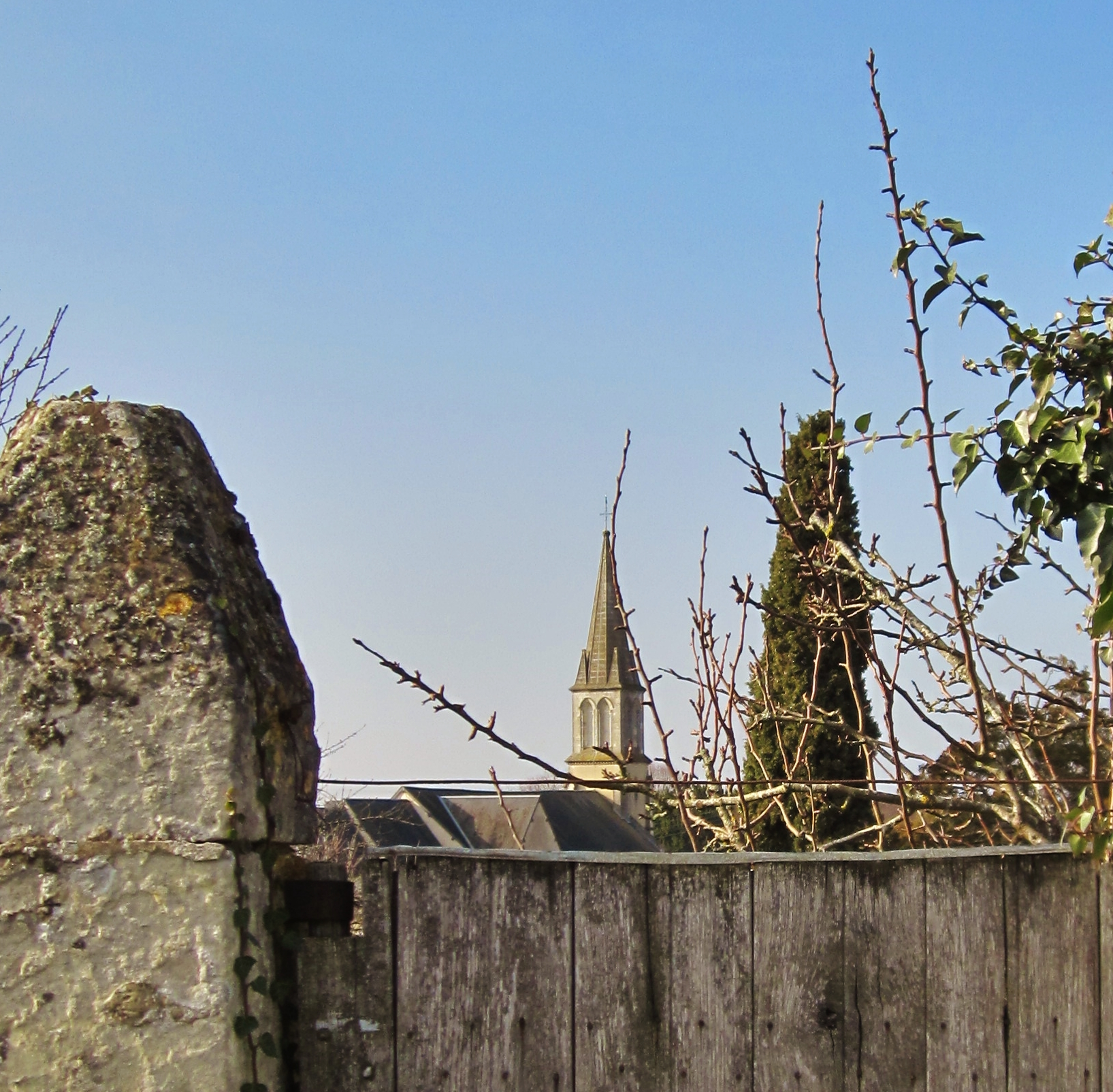 Vue sur l´eglise de Houssay